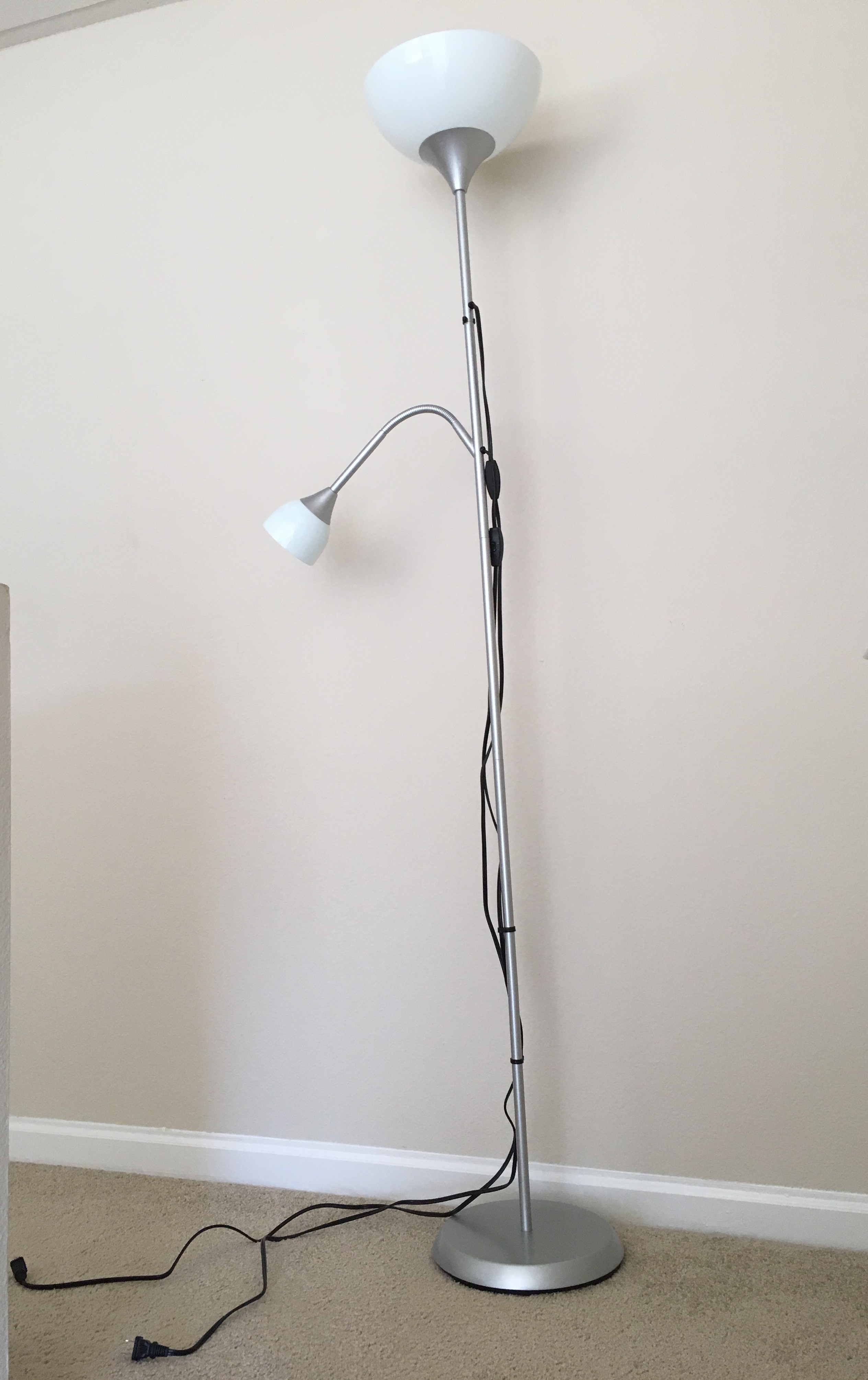 Floor lamp